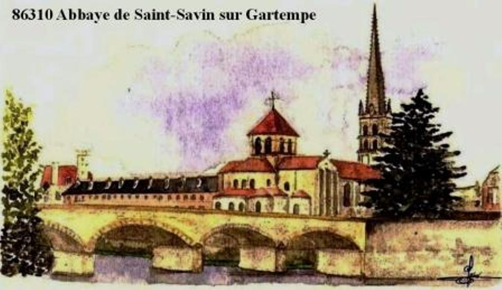 Dessin N° 02 de Saint-Savin-sur-Gartempe